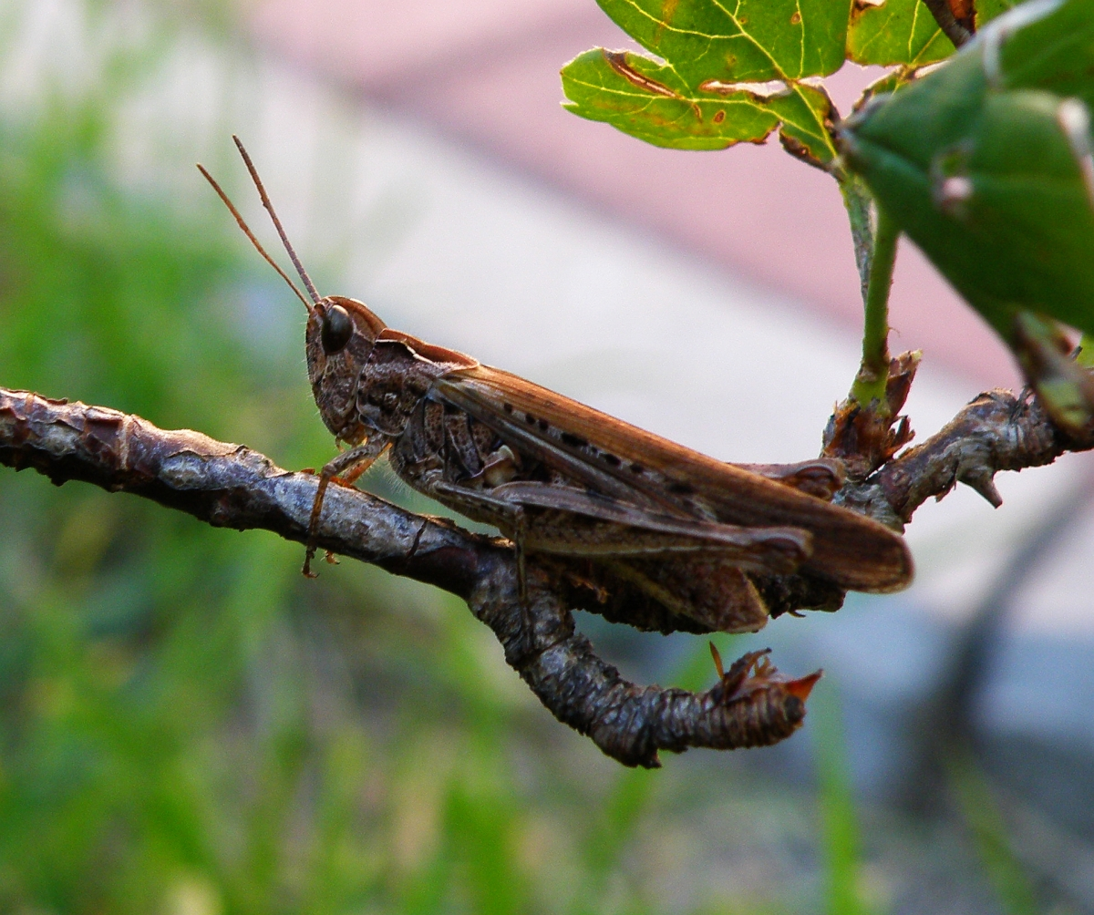 Konik polny, konik pospolity (Glyptobothrus biguttulus)